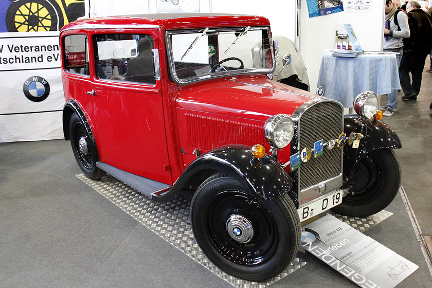 1933 BMW AM4